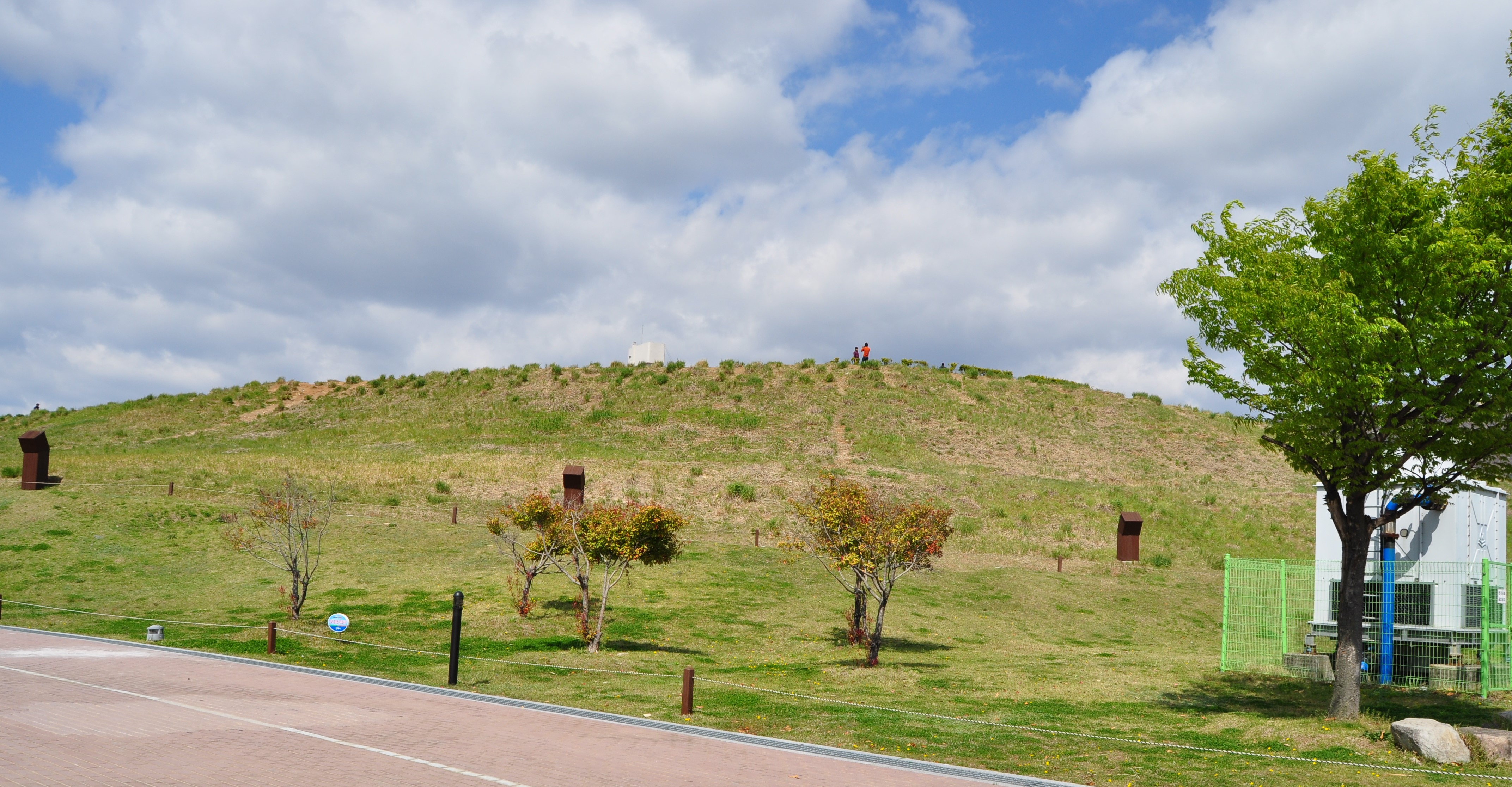 김해 대성동 고분군 (경남 김해시 대성동 소재, 사적 제341호)